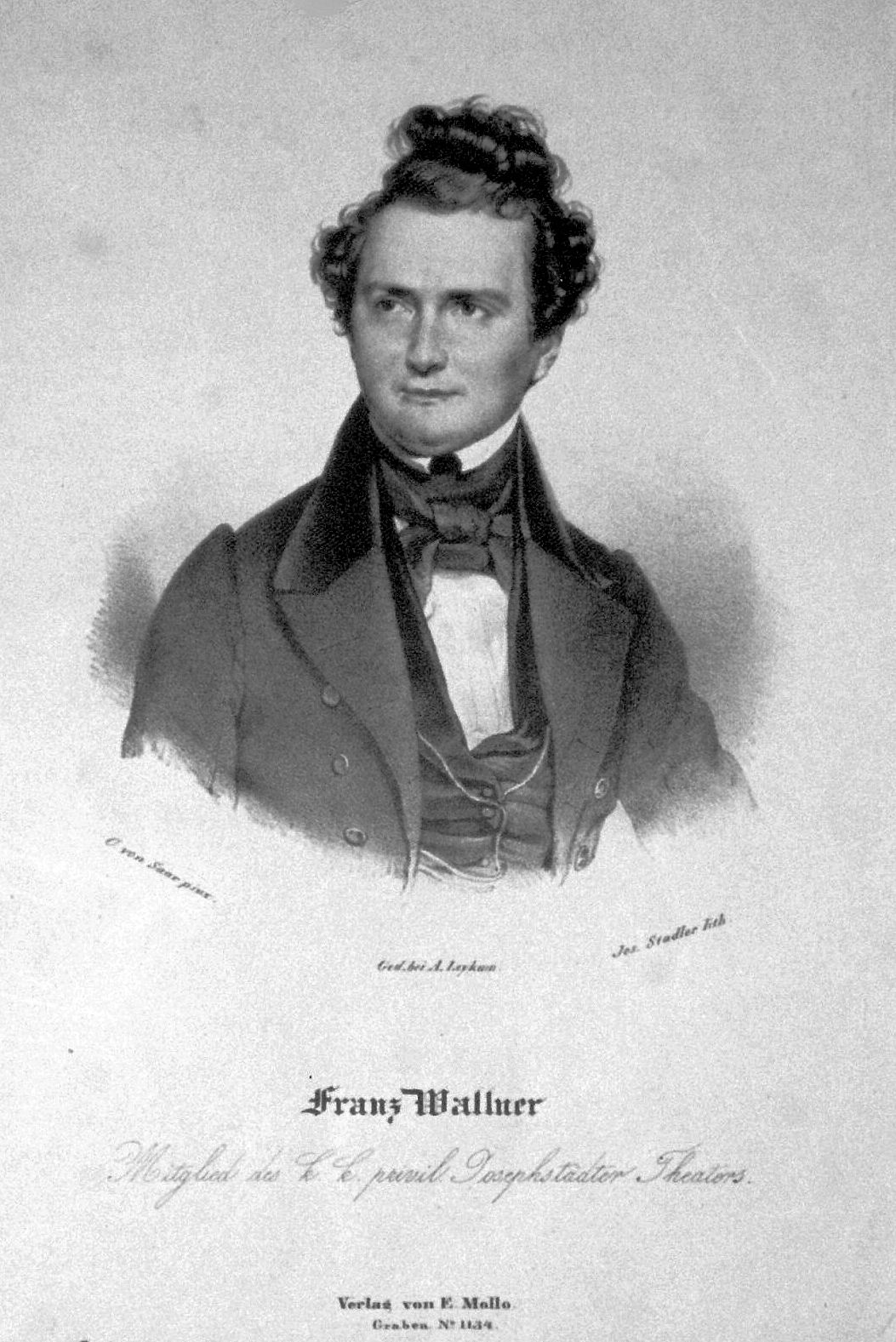 Franz Wallner, Lithographie von J. Stadler nach einem Gemälde von C. von Saar